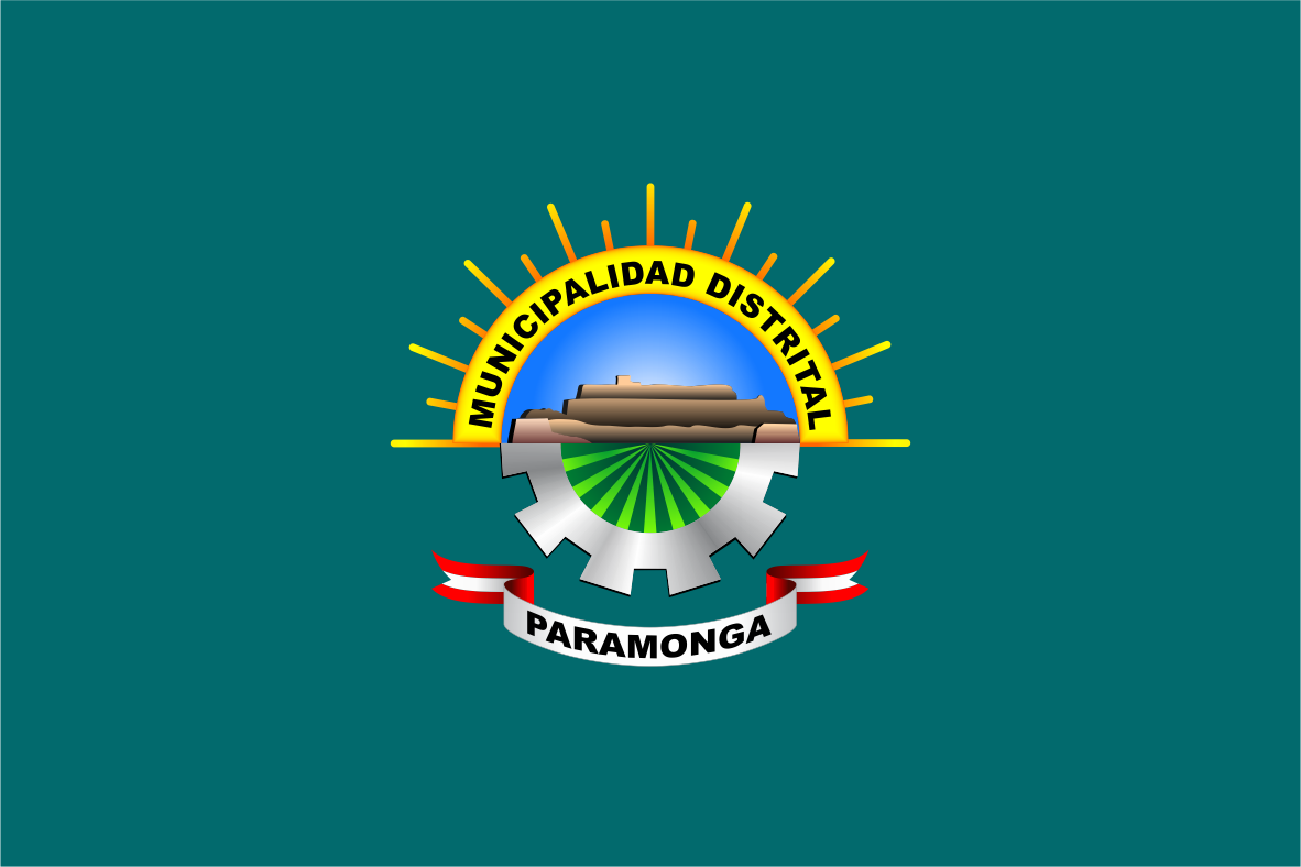 Distrito de Paramonga